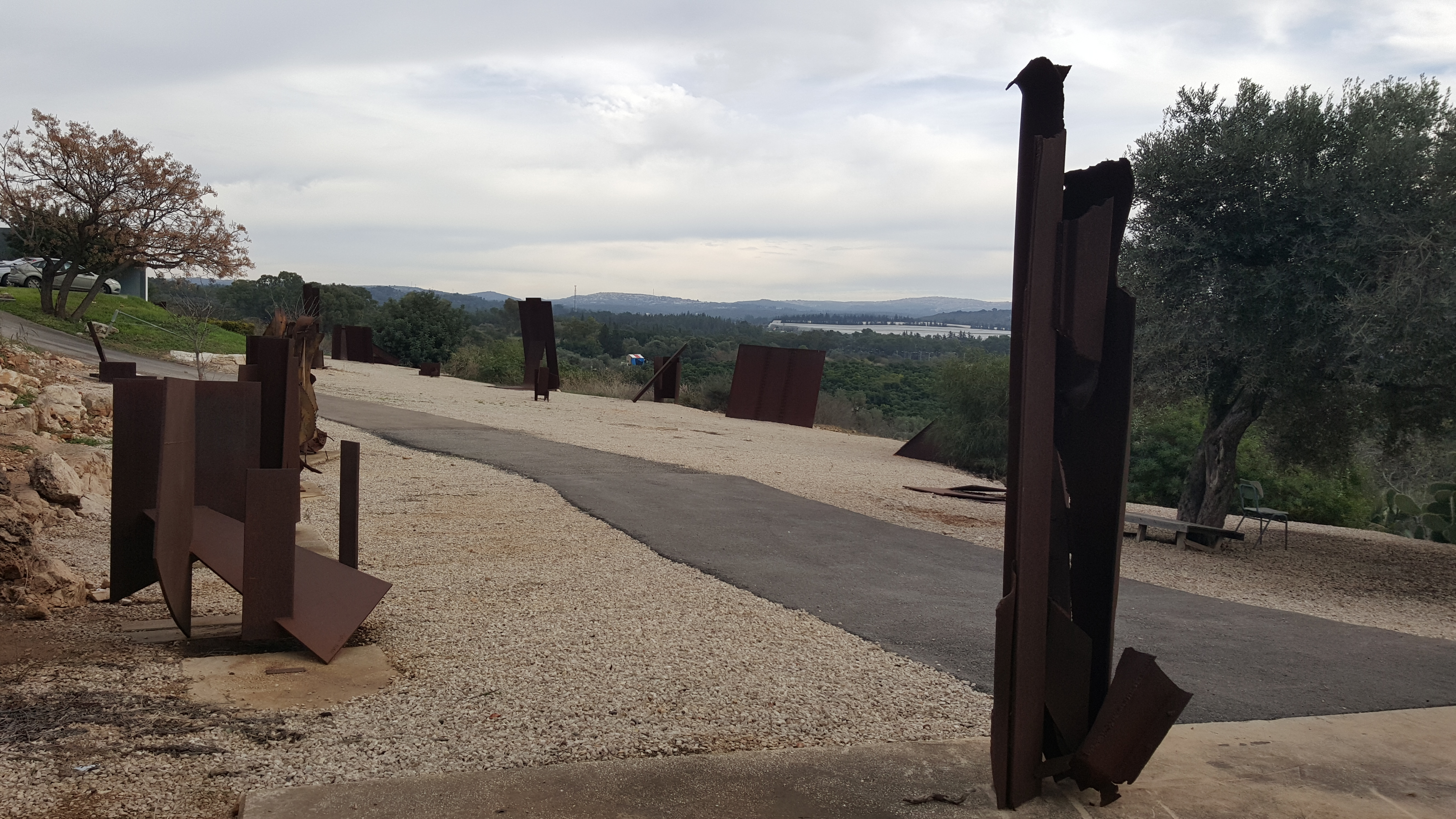 גן הפסלים